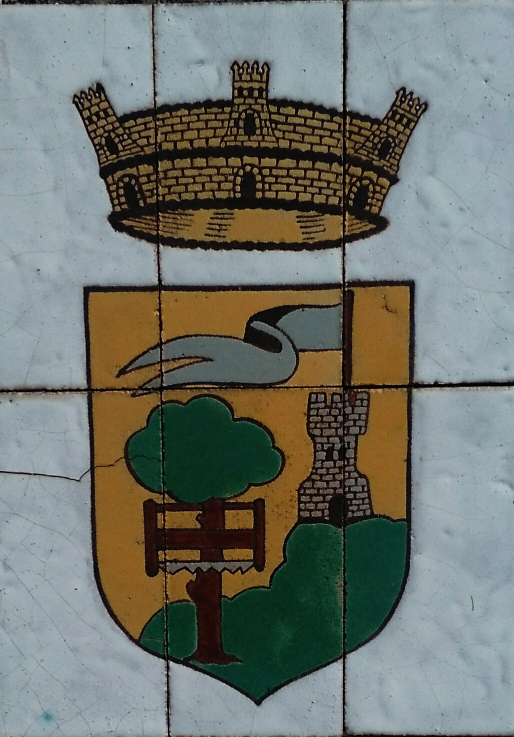 Escut oficiós de Viver i Serrateix en ceràmica al Castell de Berga.